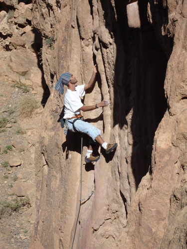 Jean Roussie - Escalade à Amellago (Maroc)